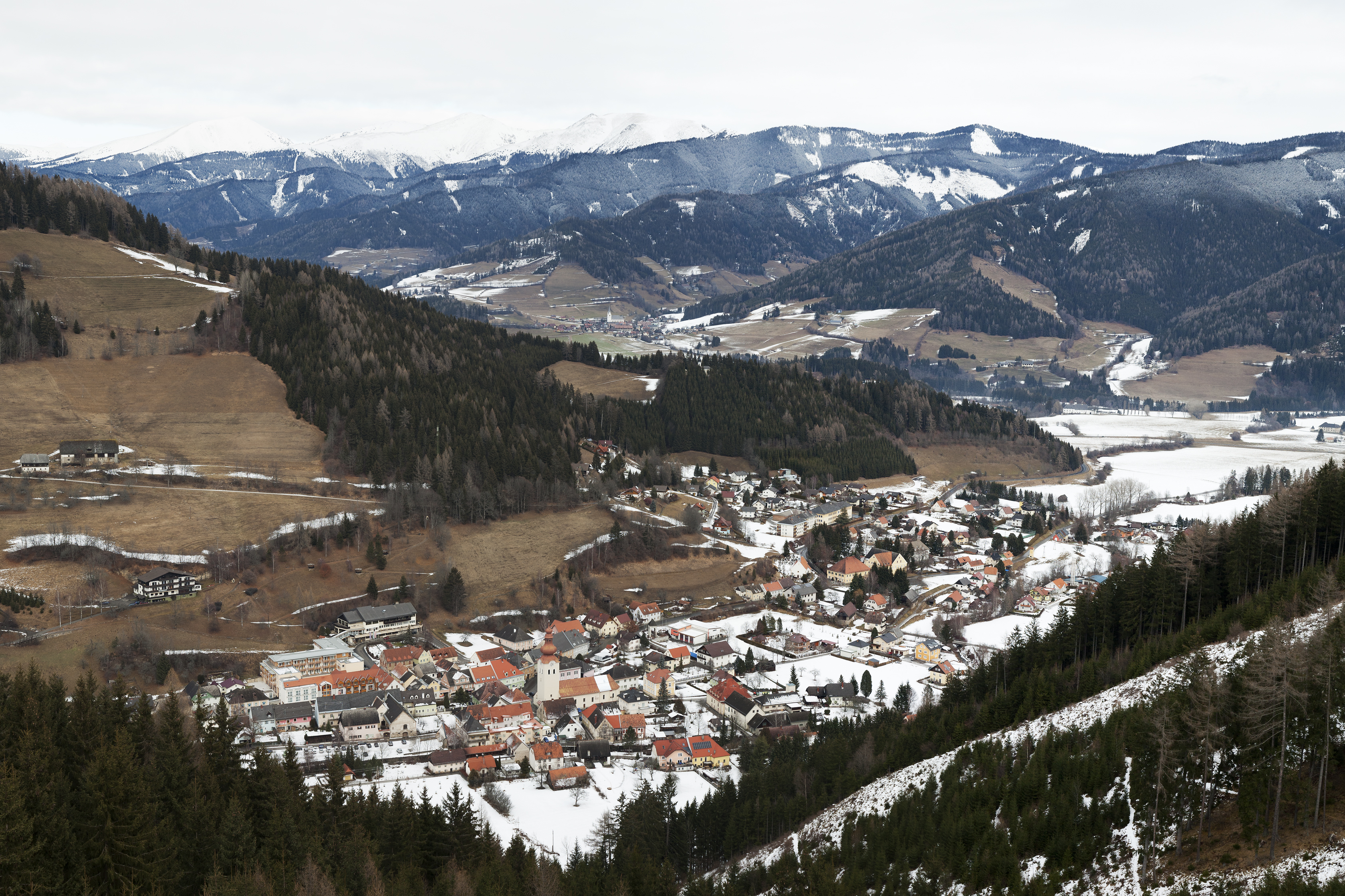 Blick auf Oberzeiring